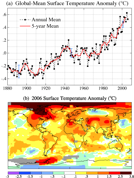 Global gemittelte Anomalie der Oberflächentemperatur der Erde, GISS Surface Temperature Analysis, Auswertung aus Temperaturmessungen, zeigt Globale Erwärmung der Erde